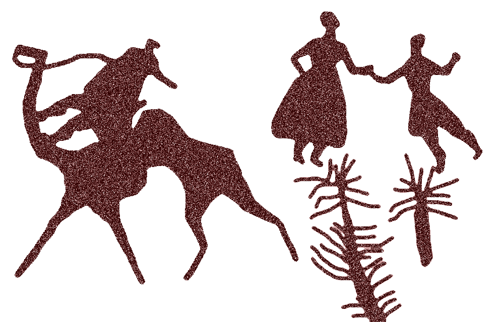 Tassili n'Ajjer, camellero y otras figuras